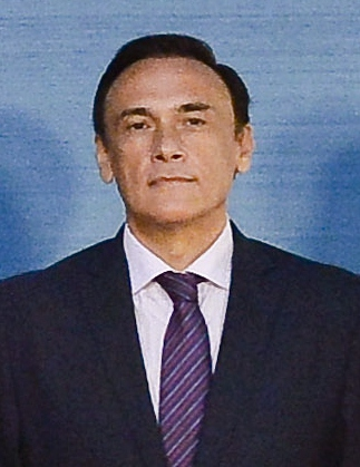 José Carlos Gómez Villamandos, rector de la Universidad de Córdoba (2014)